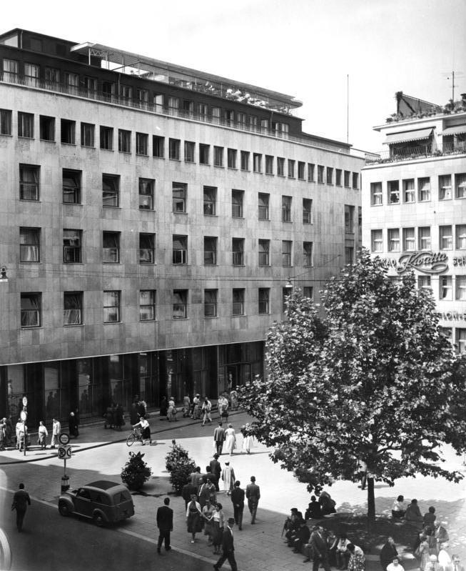 Kölner Funkhaus